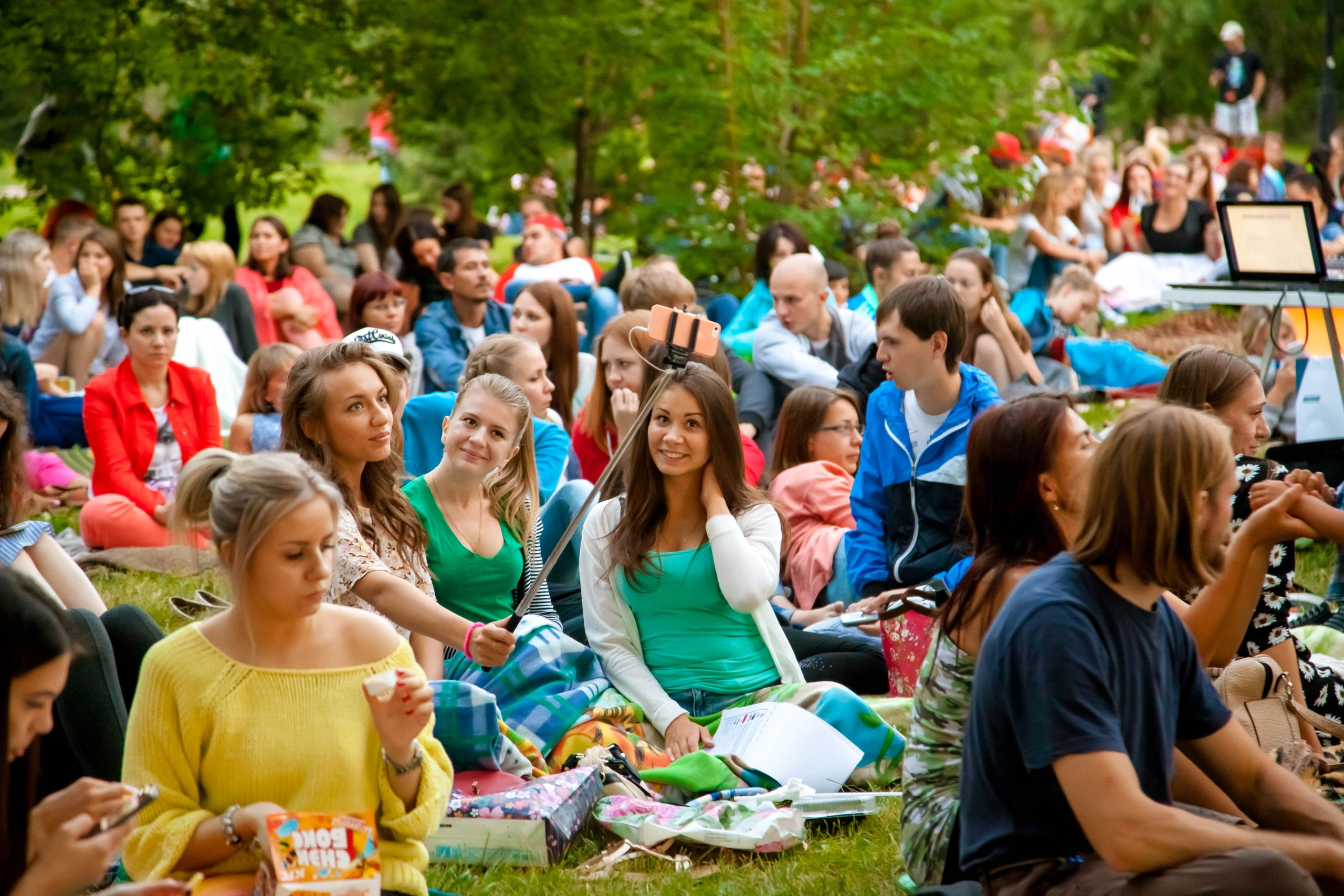 Фестиваль уличного кино в Красноярске, 2015